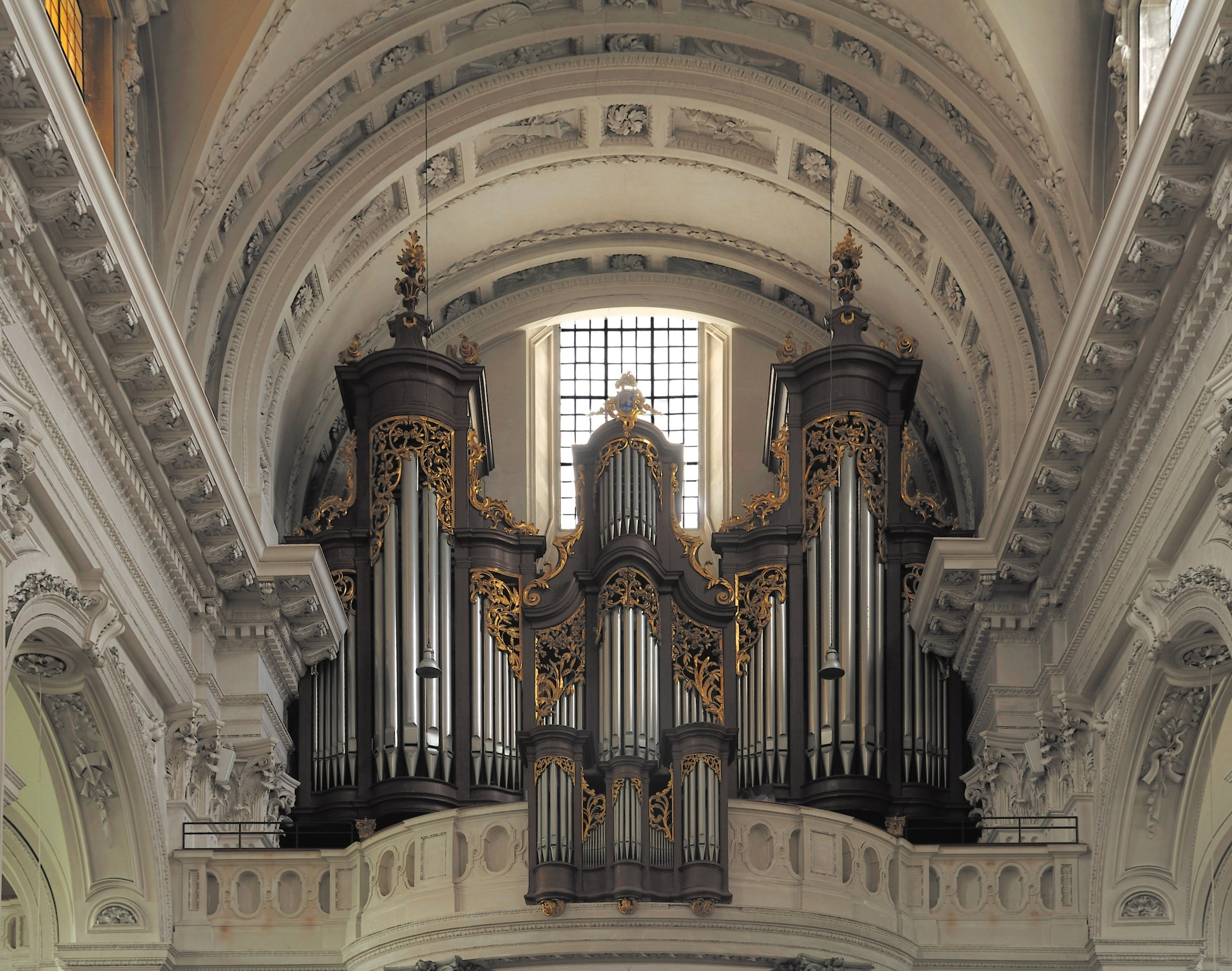 Solothurn: Orgel der St. Ursenkathedrale